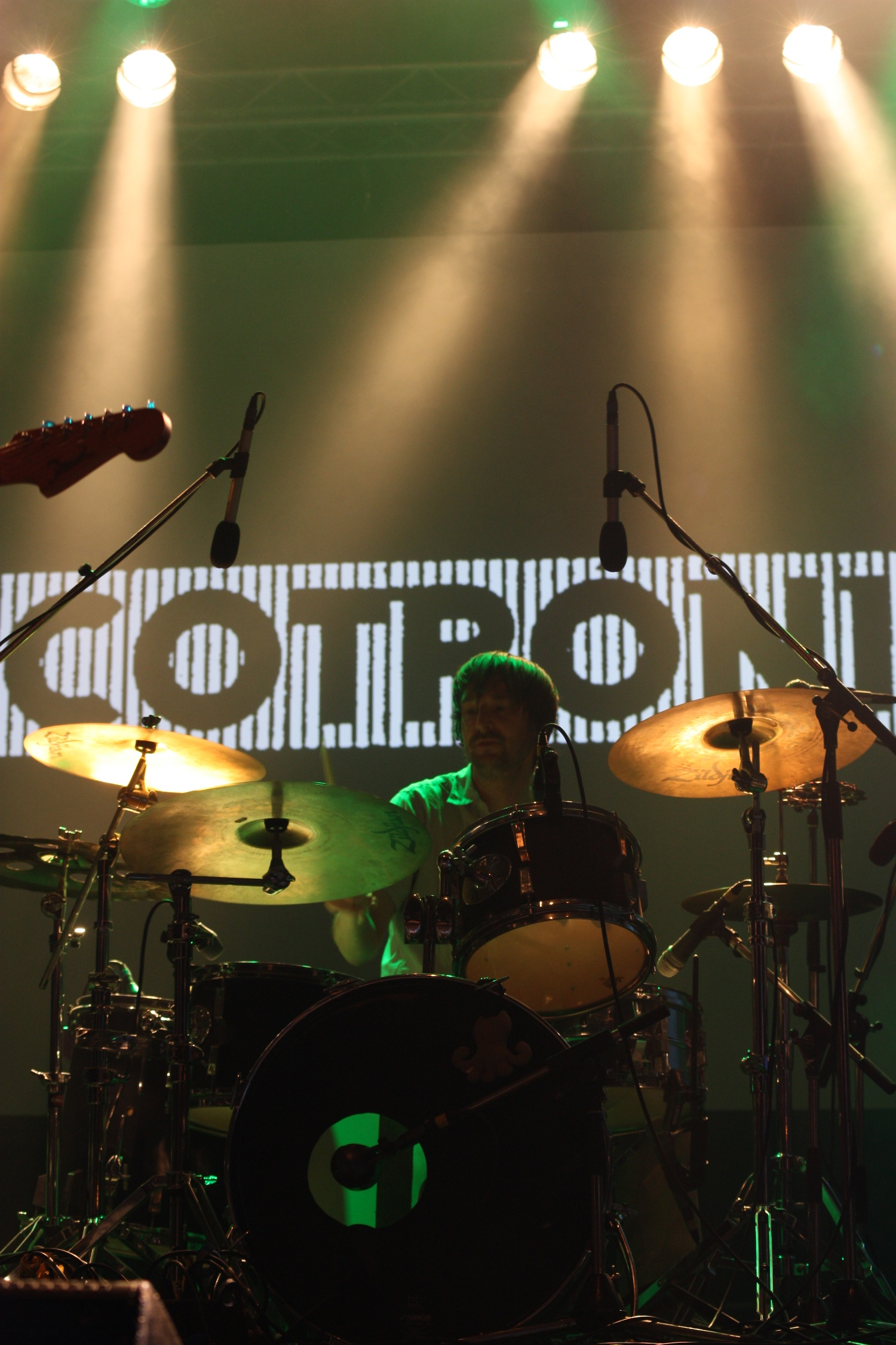 Folklore 013 in Wiesbaden, Auftritt der Gruppe Tocotronic